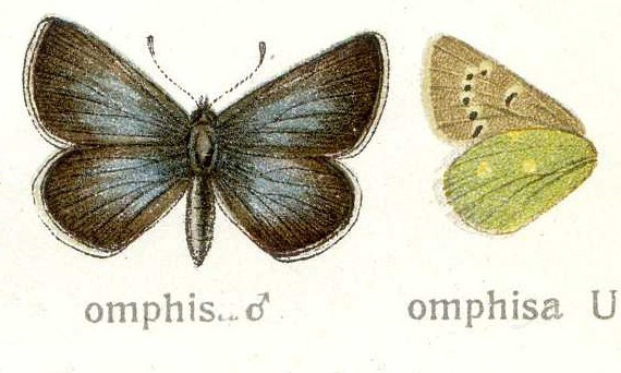 Albulina omphisa